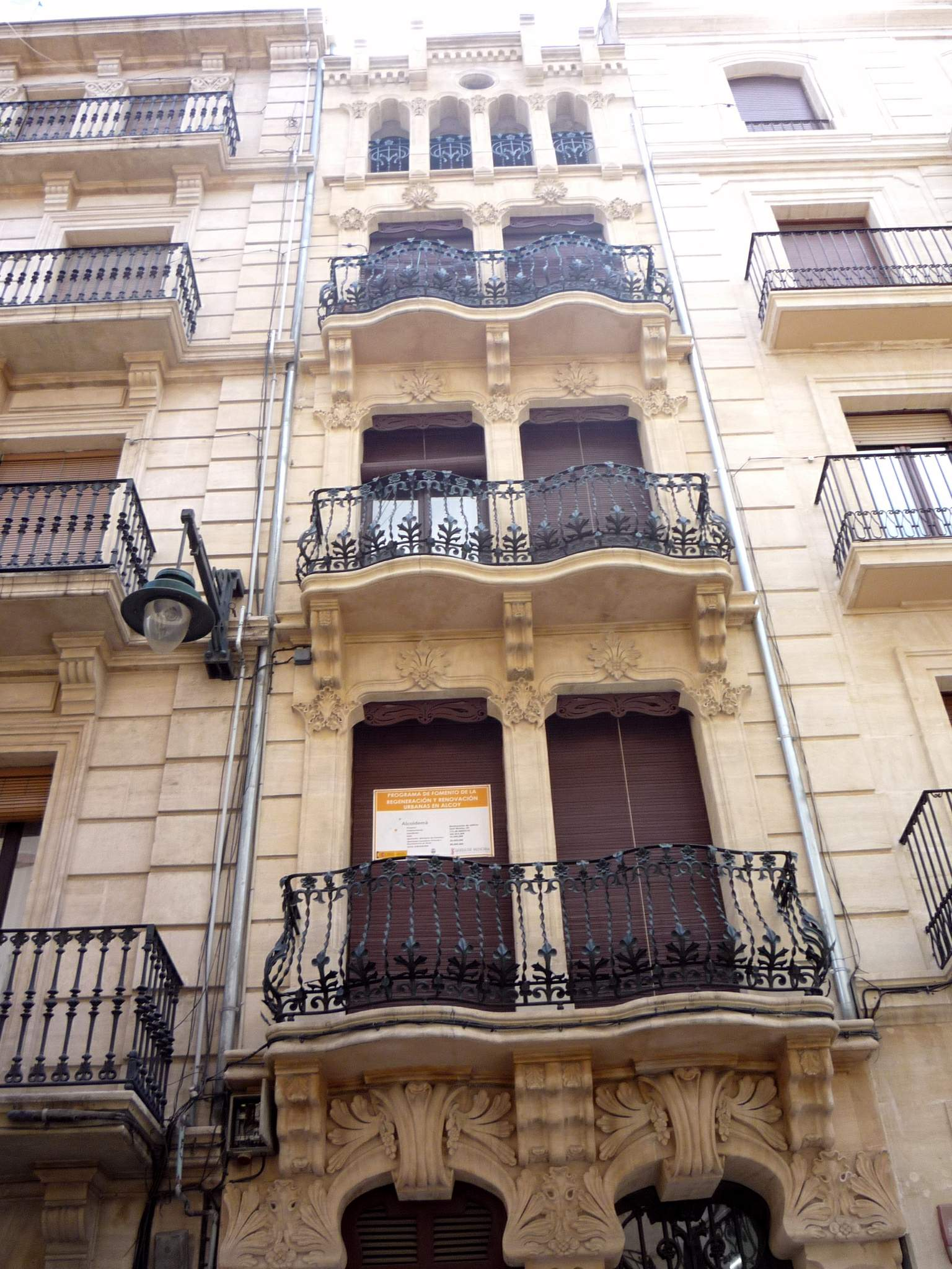 Edificio modernista en la Calle Sant Nicolau, 29 (Alcoy)